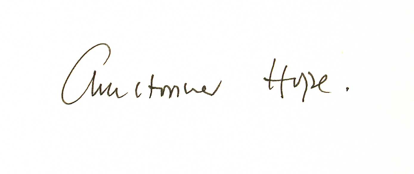 Christopher Hope Unterschrift